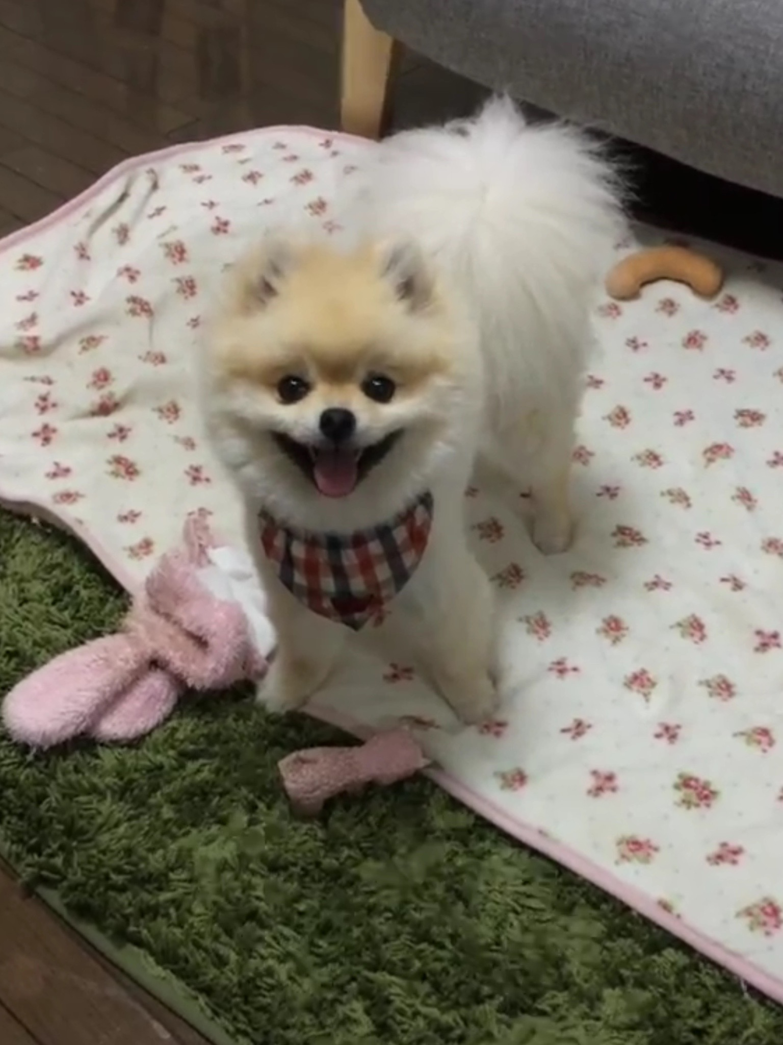 Pomeranian